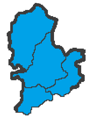 Alcaldes de la Comarca de Paradanta.